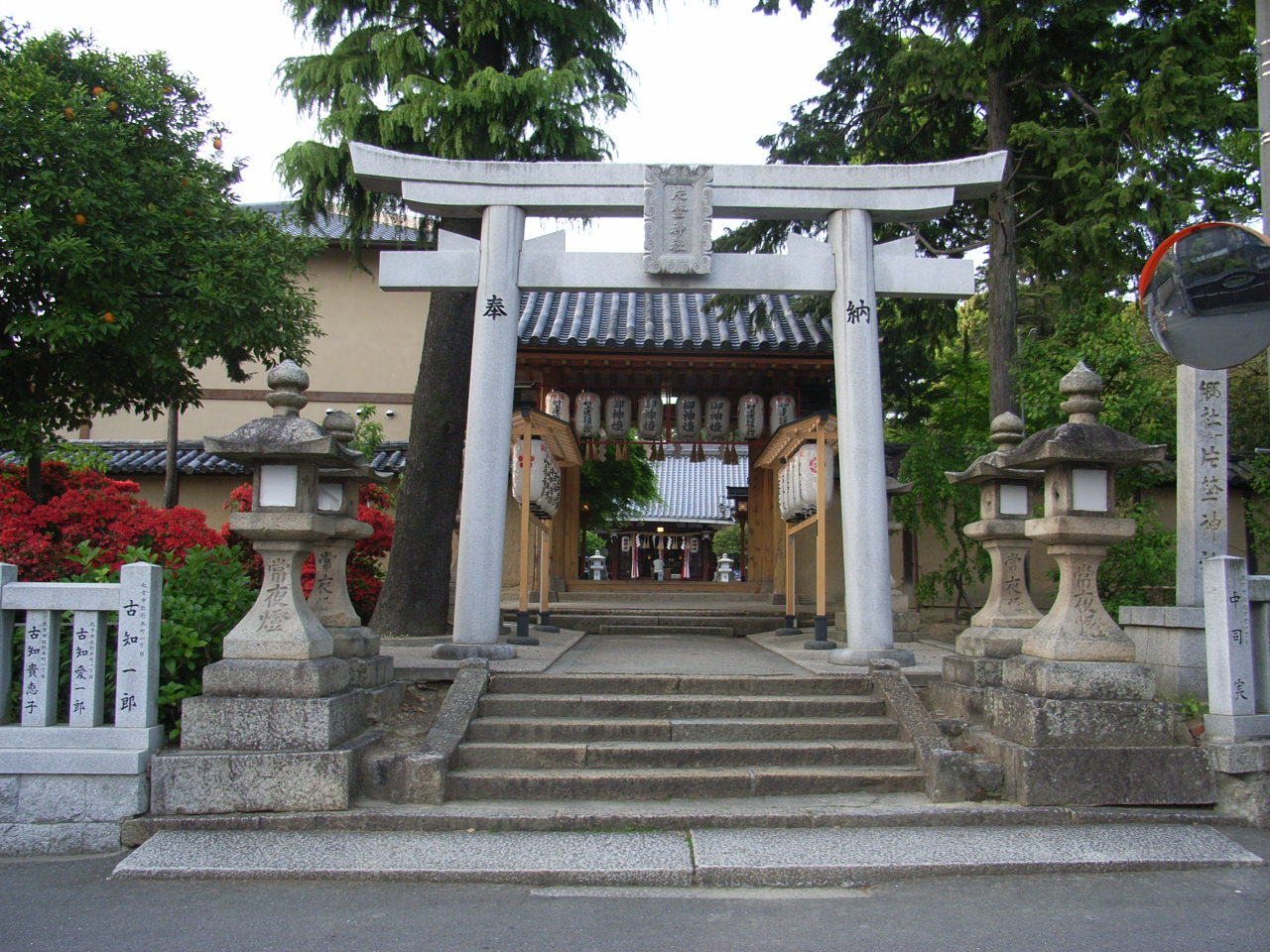 片野神社正面